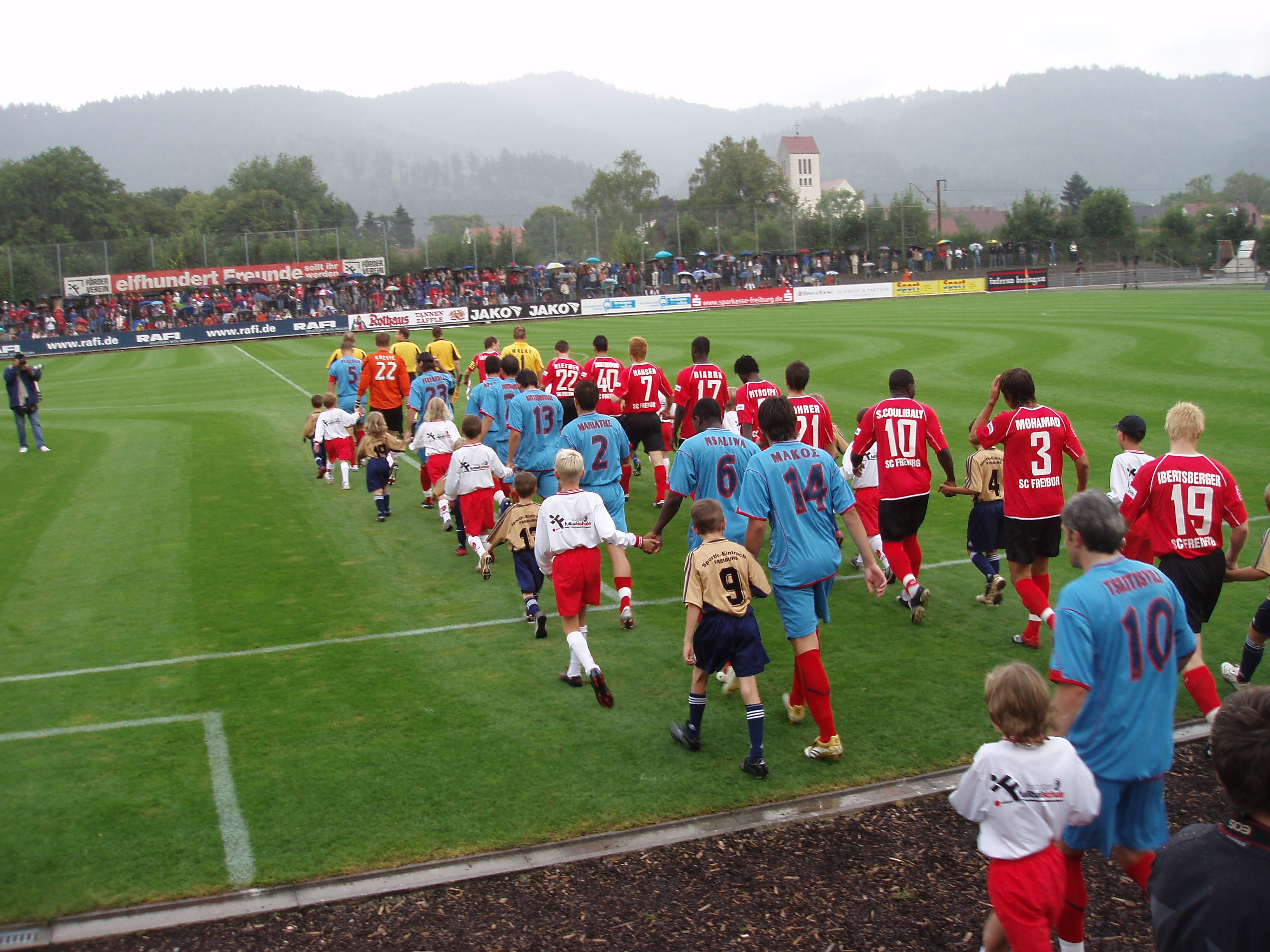 Möslestadion in Freiburg (Testspiel SC Freiburg empfängt Panatinaikos Athen bei der Saisoneröffnung 2006)